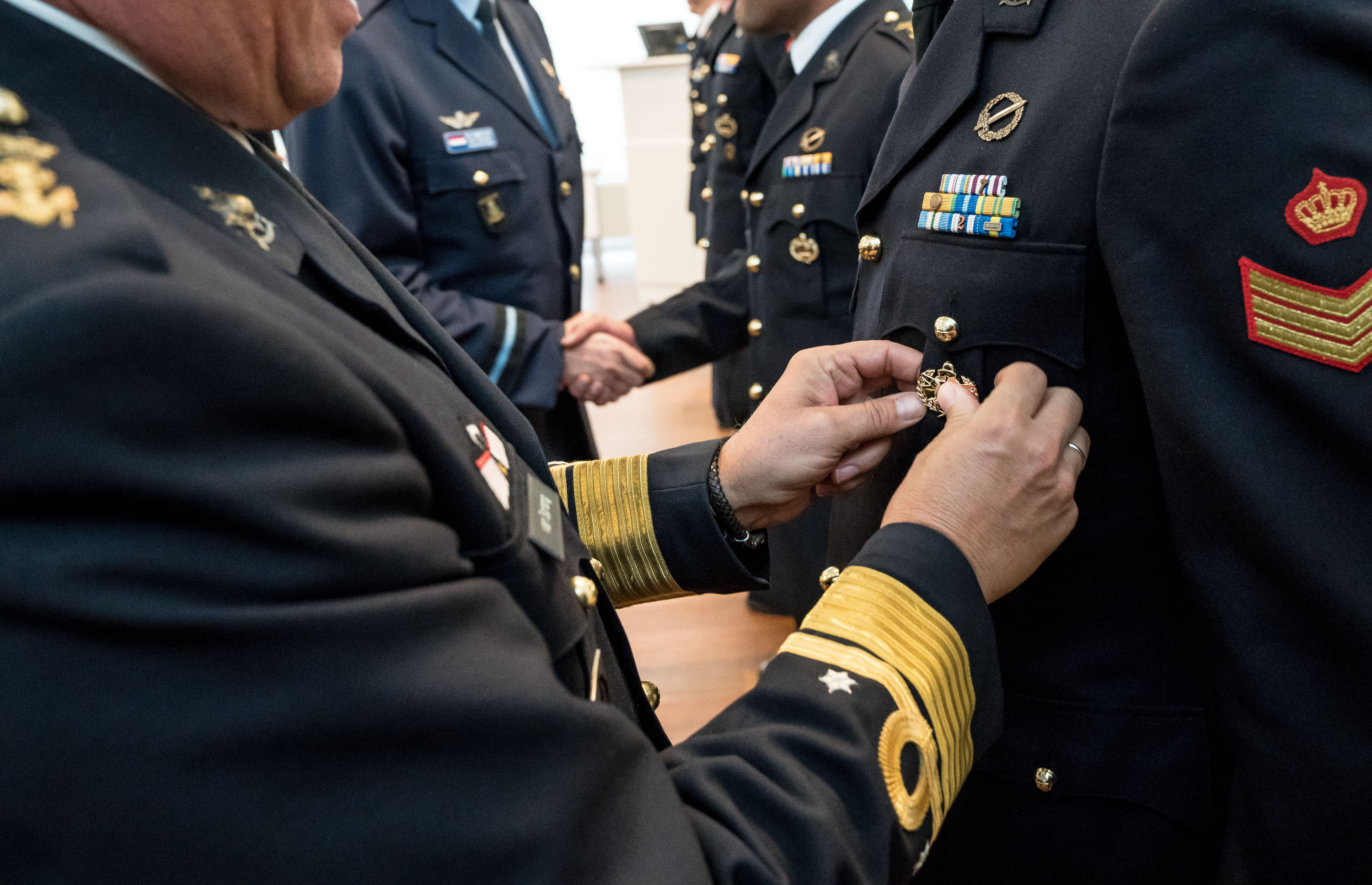 De toenemende activiteit van Somalische piraten vormde in 2008 een serieuze dreiging voor de vrije internationale zeevaart. Piraten gijzelden tientallen koopvaardijschepen met hun bemanningen voor losgeld. Toenmalig minister van Defensie Hans Hillen vond dat Nederland als zeevarend land meer moest doen tegen de Somalische piraten. Zodoende ontstond Task Force Barracuda. De eenheid bestond uit Netherlands Maritime Special Operations Forces (NLMARSOF) van het Korps Mariniers. Barracuda kreeg de opdracht om de piraterij te bestrijden en wel zo dicht mogelijk tegen de kustlijn.